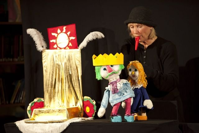 Marits Dukketeater